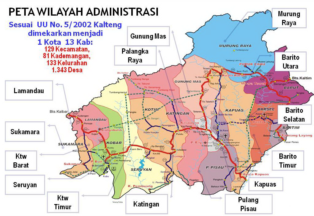 Wilayah Hukum Polda Kalteng